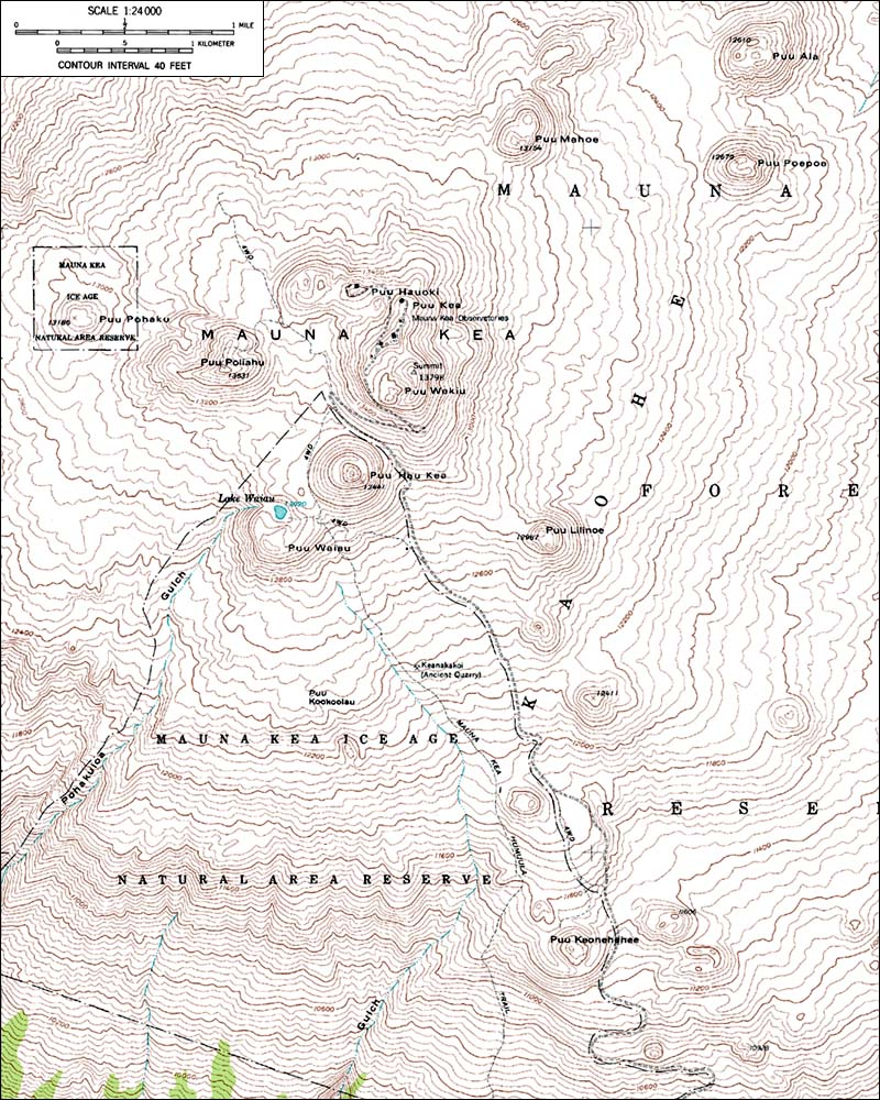 Carte du Mauna Kea à Hawaii à l'échelle 1:1:24.000 Photographie : USGS Andere Versionen